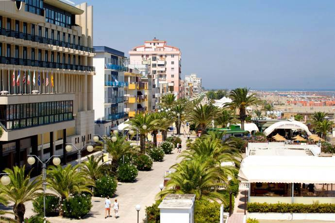 Il Lungomare di Margherita di Savoia si estende per una lunghezza di 1,7 Km (circa) accompagnando la splendida spiaggia naturale. Lunga e larga, adagiata su uno scorcio del mare Adriatico quasi sempre limpido, la spiaggia di Margherita di Savoia è la più grande della costa del Tavoliere ed è composta da una sabbia fine e brunita, di una grana molto particolare; grazie alla sua vasta estensione offre la possibilità di scegliere fra più di 72 stabilimenti balneari ben attrezzati.